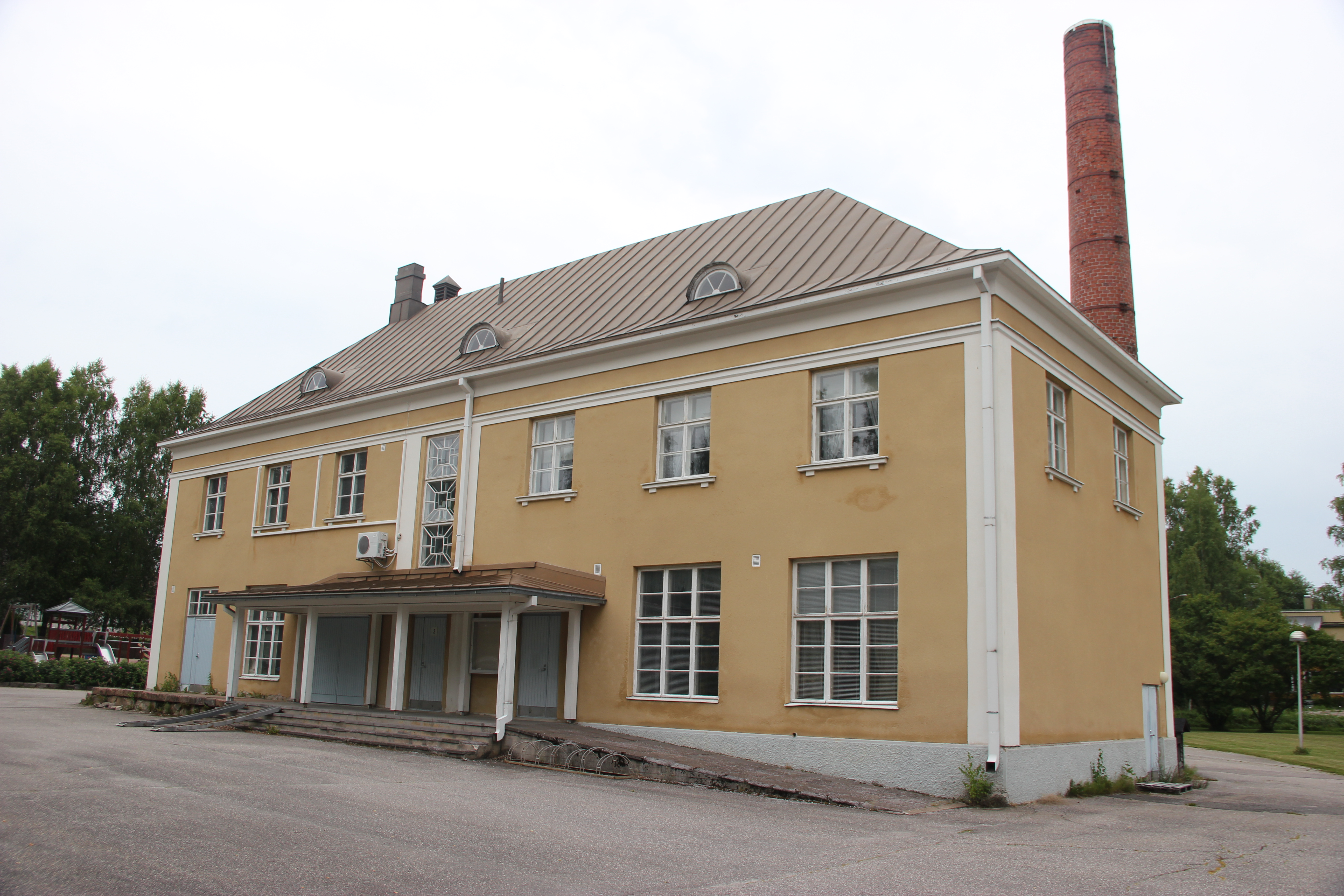 Kiskon osuusmeijeri, nyk. omistaja Salon kaupunki